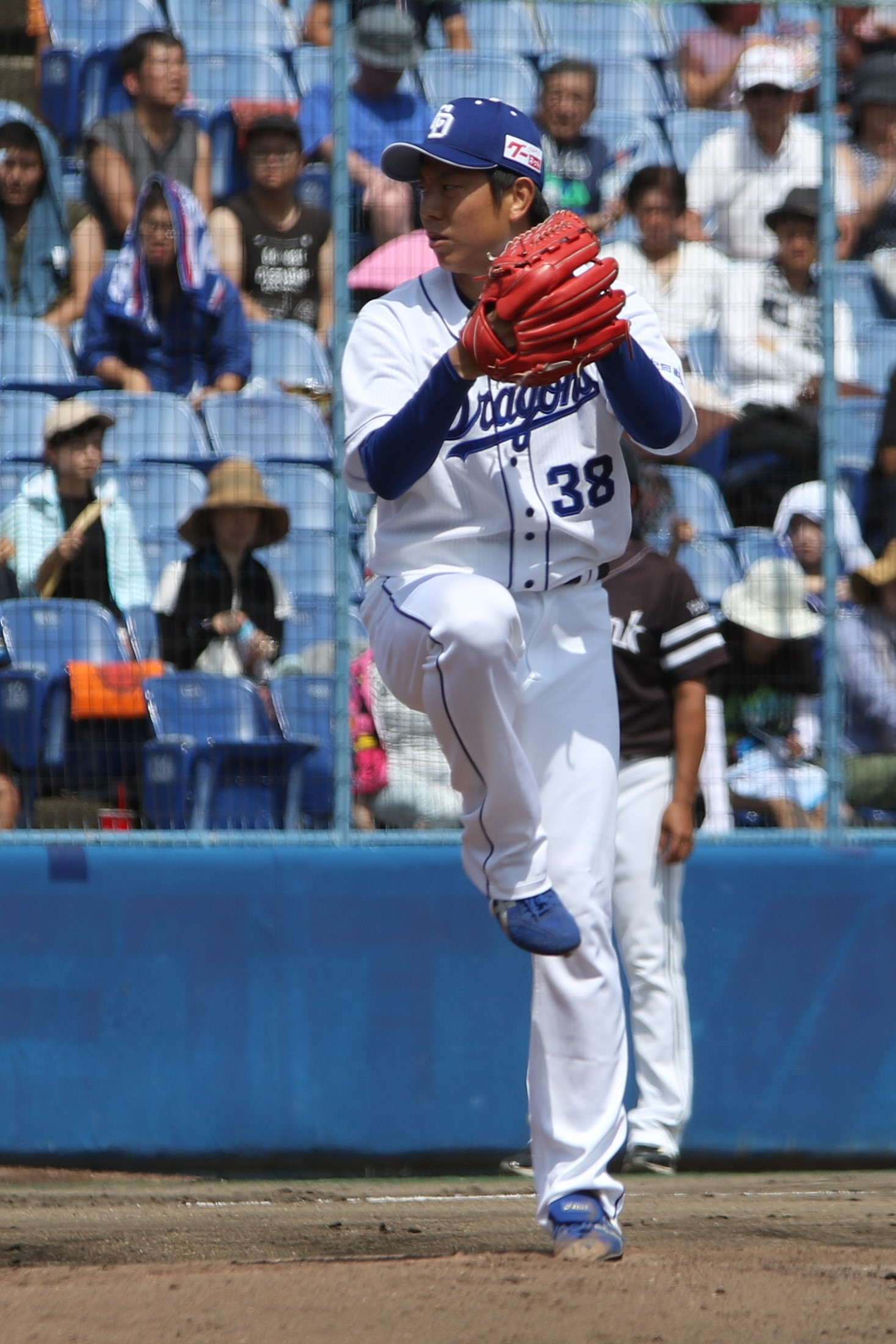 投球中の松葉